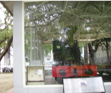 2006.02 國立臺灣博物館前展示的騰雲號